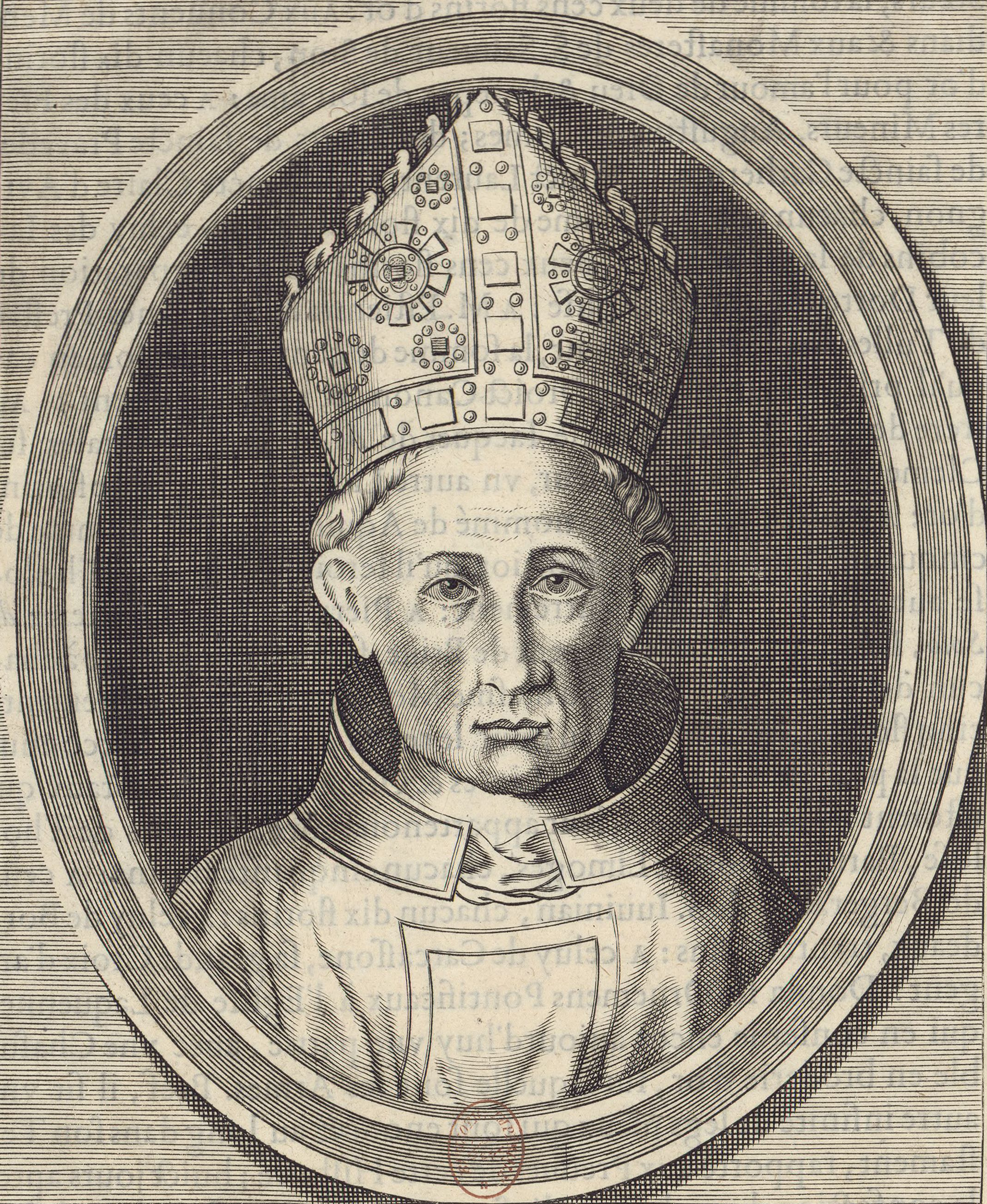 Portrait du cardinal Guillaume d'Aigrefeuille (1339-1401)